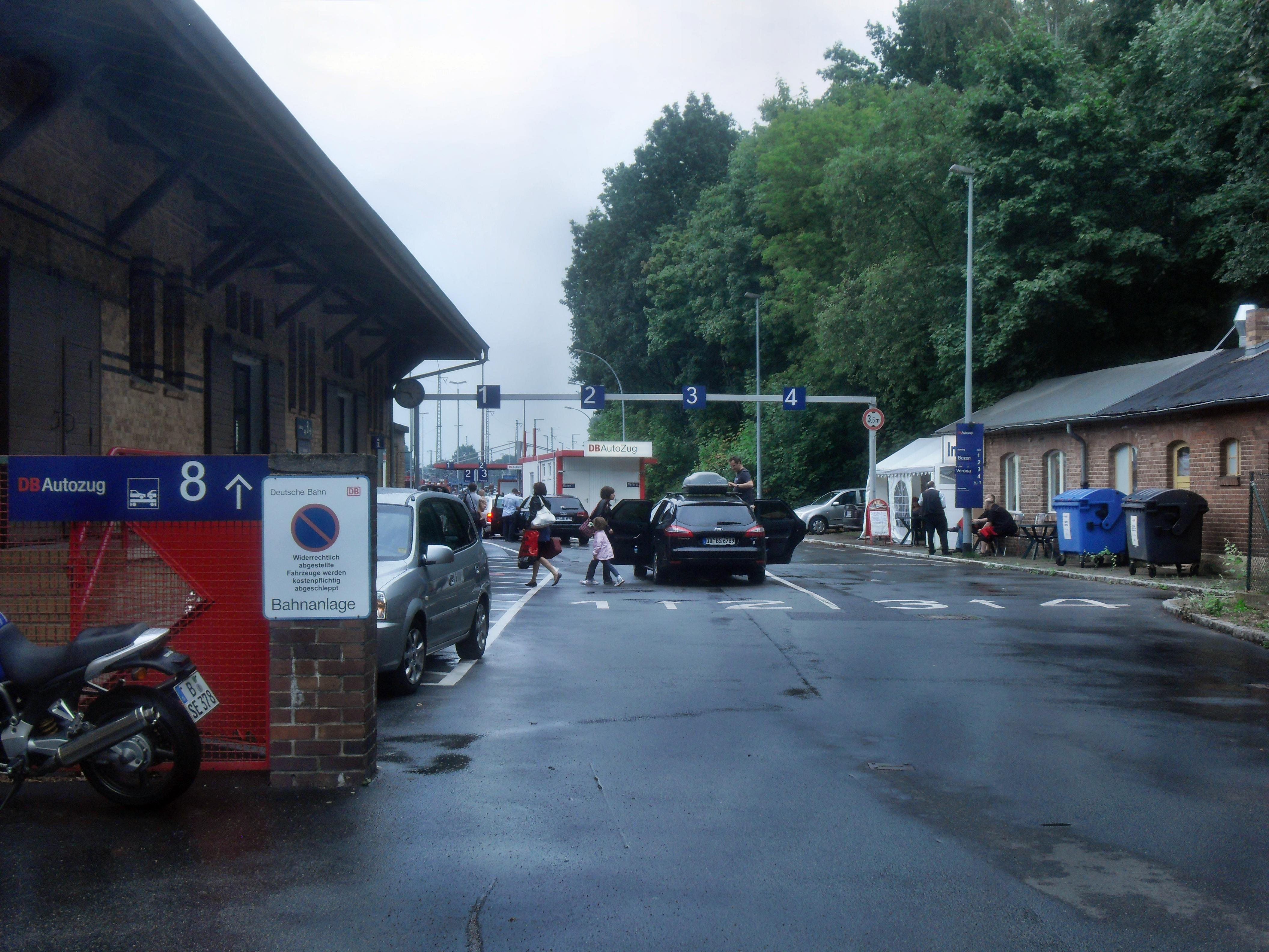 Einfahrt des Geländes von DB AutoZug im Bahnhof Berlin-Wannsee in Berlin in Deutschland